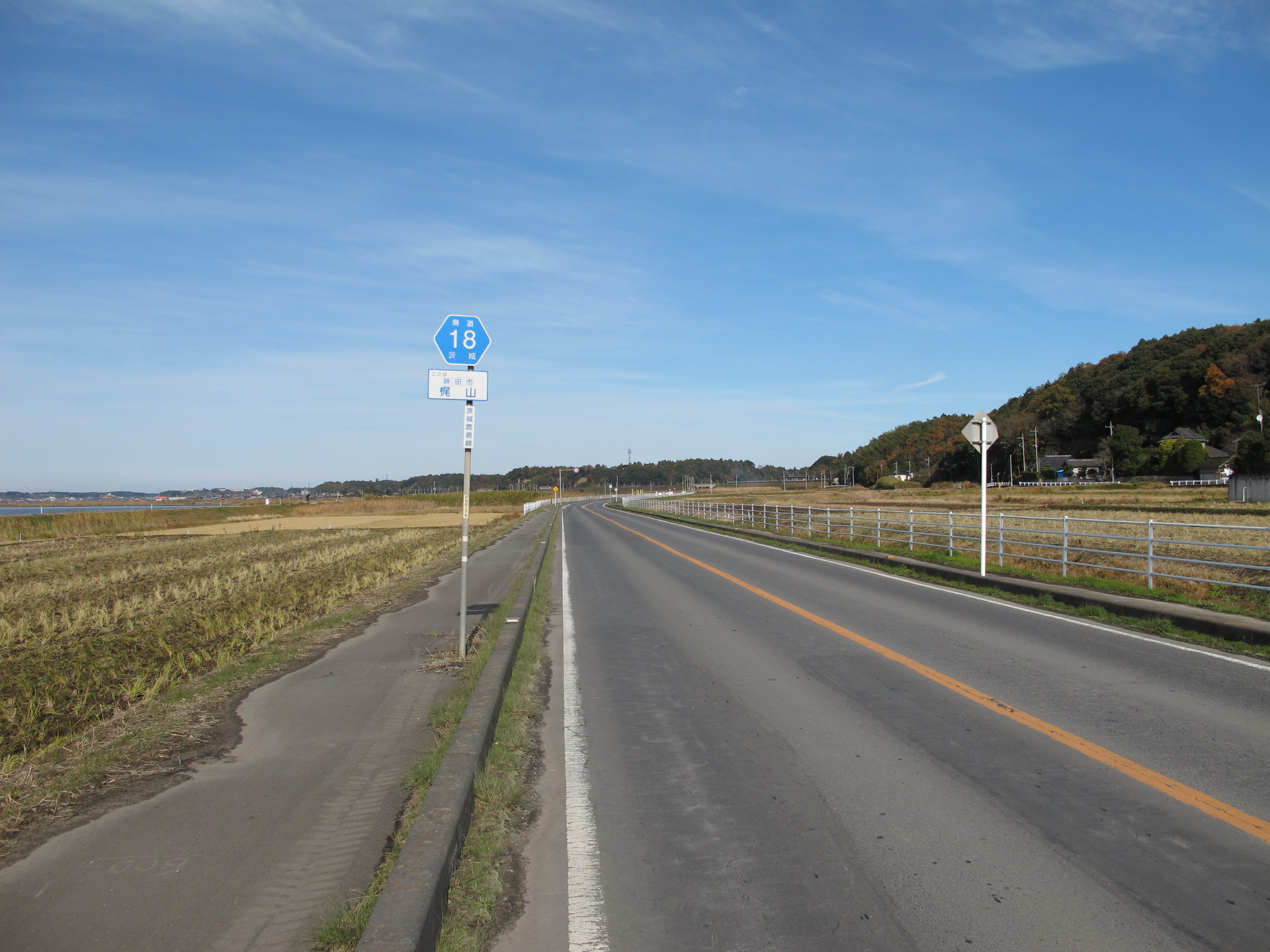 茨城県道18号茨城鹿島線（鉾田市梶山）